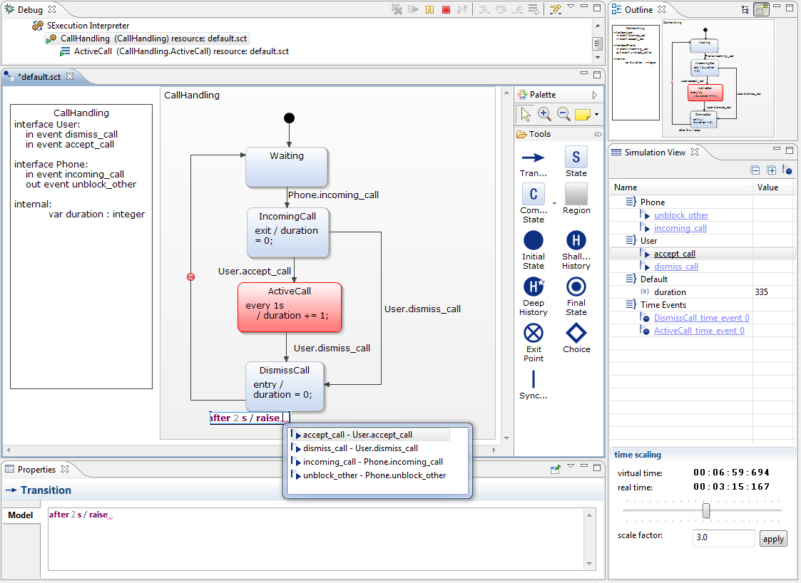 Zustandsautomaten.